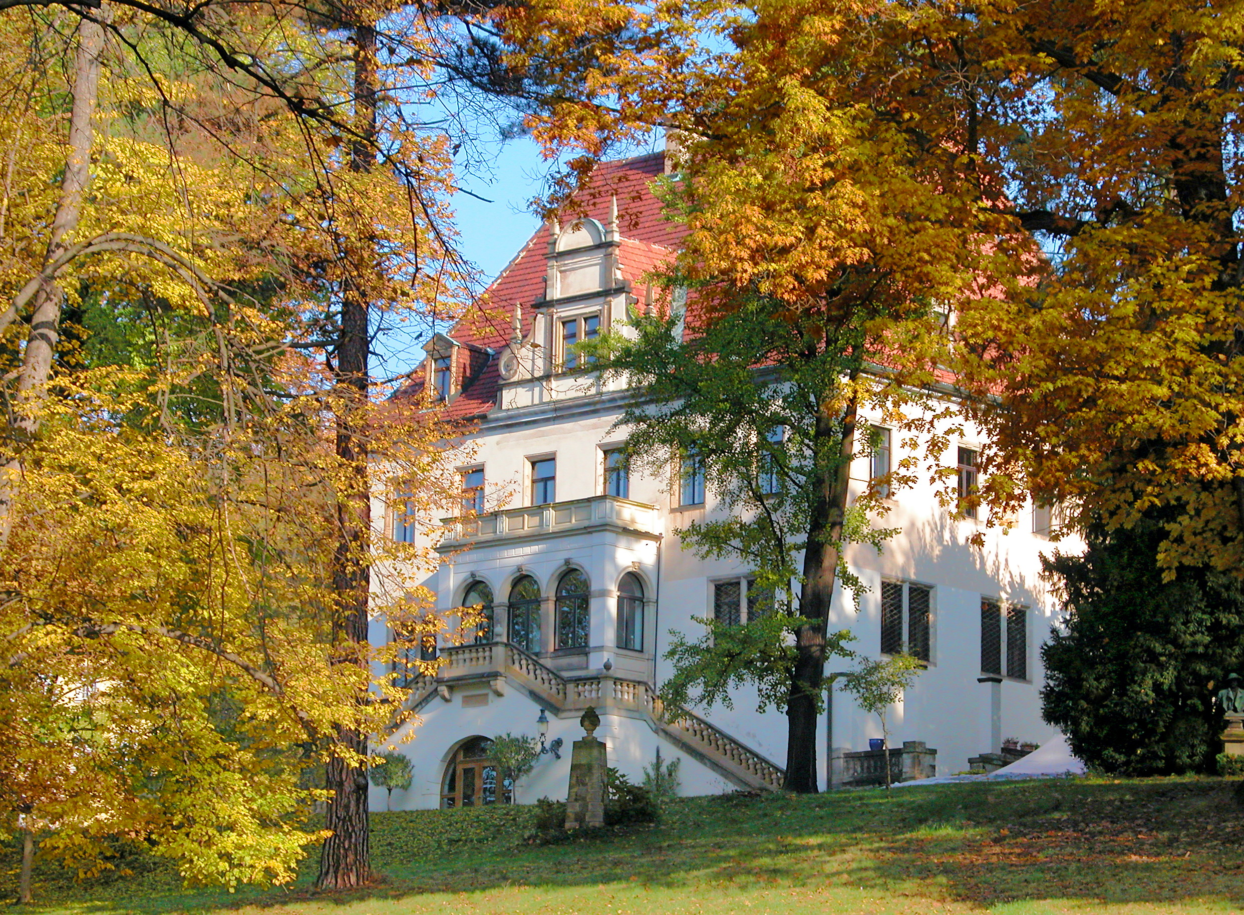 30.10.2009 01445 Radebeul-Zitzschewig: Hohenhaus, Haus Bischofsberg (ehem. Puppenmuseum), Barkengasse 6 / Ecke Hohenhausweg (GMP 51.121045,13.610670). Im 14. Jahrhundert als Weingut entstanden. In seinem Lustspiel "Die Jungfern vom Bischofsberg" setzte Gerhart Hauptmann (1862-1946) dem Radebeuler Hohenhaus ein literarisches Denkmal. Das Hohenhaus war seit 1865 im Besitz des Großkaufmanns Berthold Thienemann, dessen drei Töchter drei Hauptmann-Brüder ehelichten. Seine Verlobung mit Marie Thienemann feierte Hauptmann im Hohenhaus. Heutiger Bau Neorenaissance von 1885. In der DDR seit 1960 Puppenmuseum mit 25 000 Exemplaren. Nach Auslagerung der Puppen 2004 privatisiert. Sicht von Süden. [DSCN39672.TIF]20091030020DR.JPG(c)Blobelt